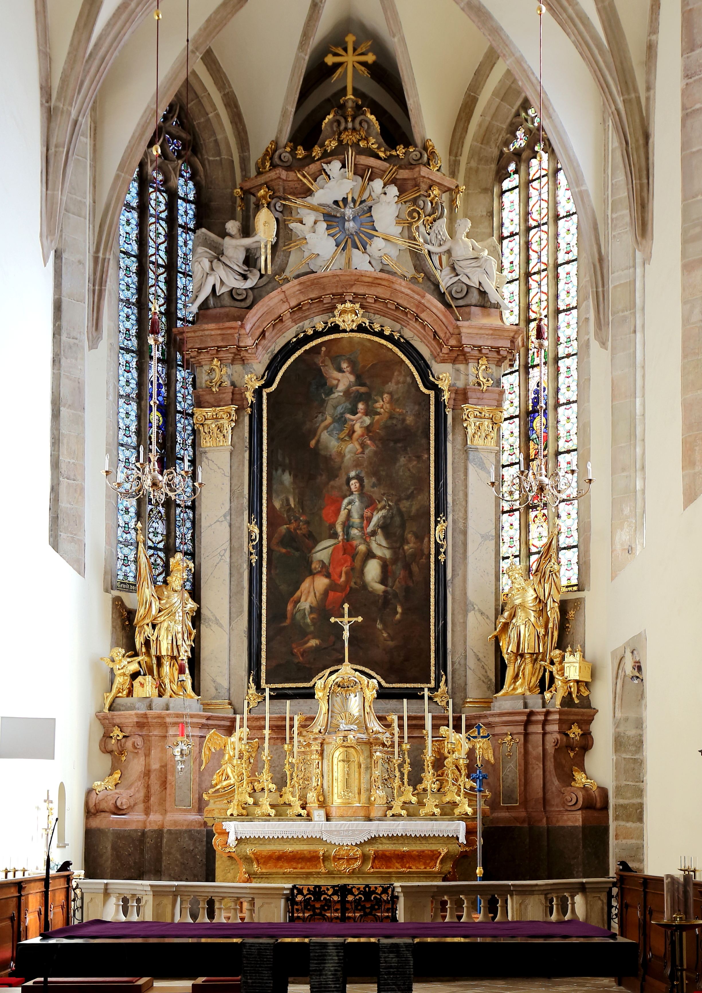 Hochaltar der katholischen Pfarrkirche hl. Martin in der niederösterreichischen Marktgemeinde Pillichsdorf. Der Hochaltar stammt aus den Jahren 1761/62. Das Altarblatt mit dem Motiv "hl. Martin bei der Mantelübergabe" ist ein Werk von Josef Pfandler.